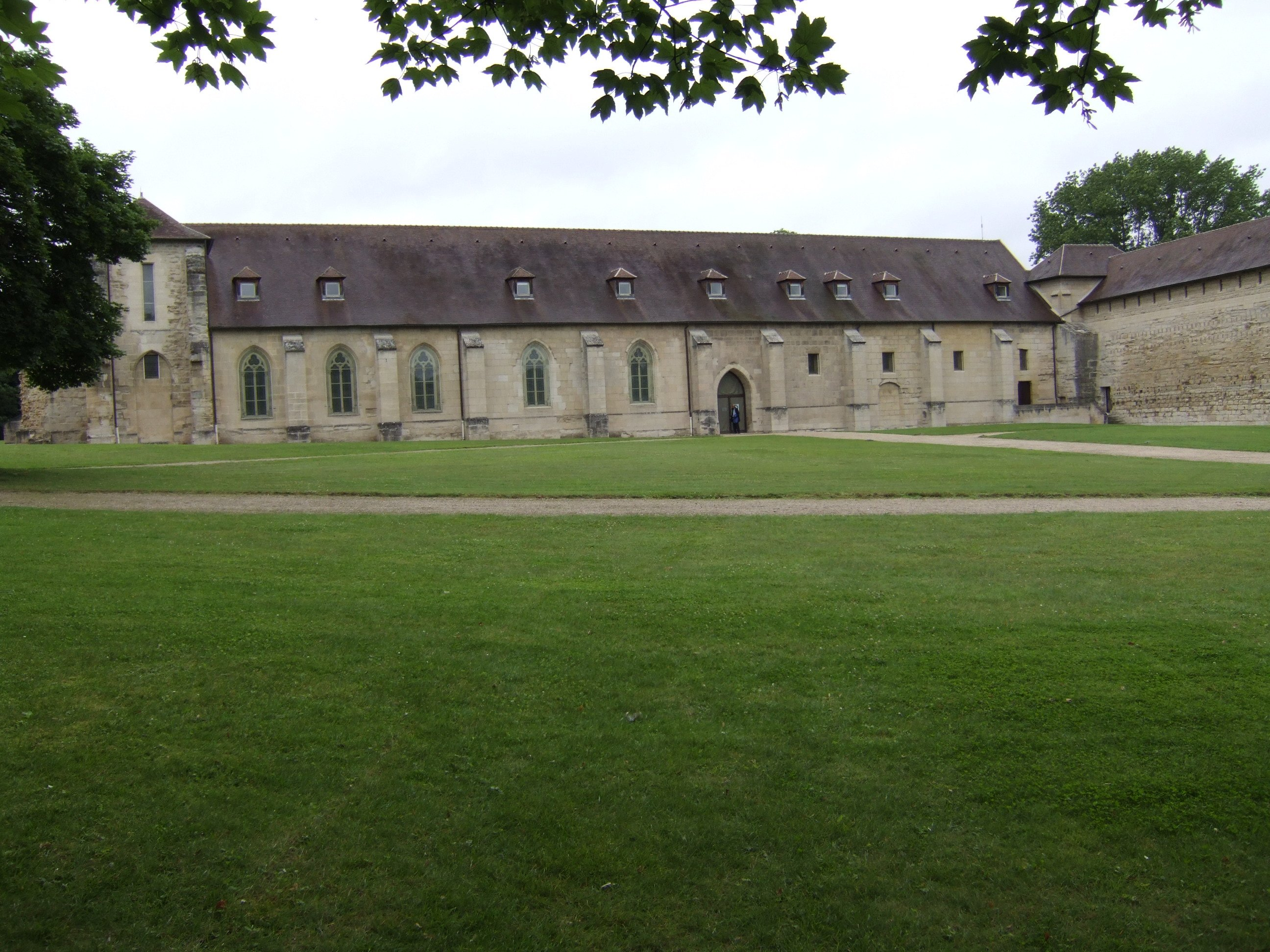 Abbaye de Maubuisson - ensemble de la façade sud